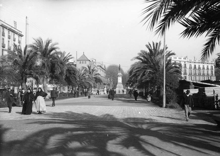 Imatge